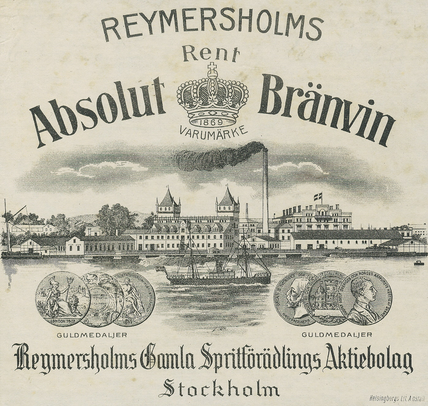 Reymersholms Gamla Spritförädlings AB "Absolut Rent Brännvin"